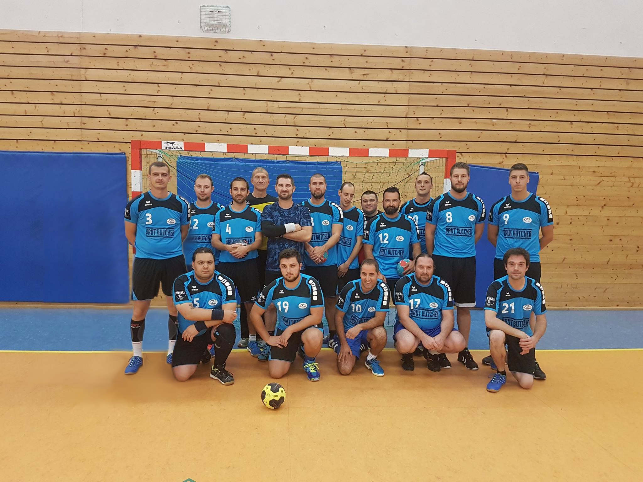 L'équipe de handball senior mixte de Sathonay-Camp